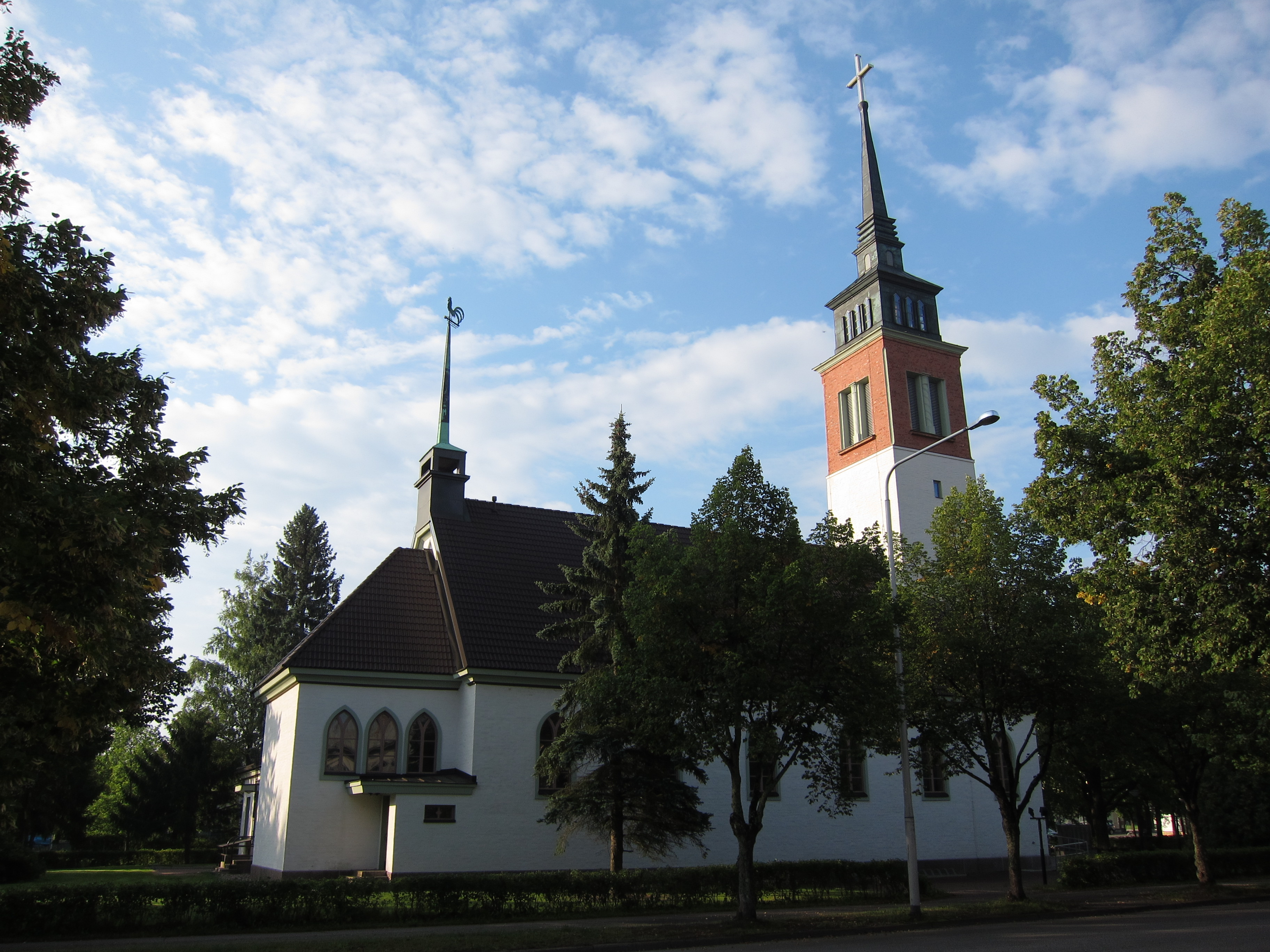 Myllykosken kirkko Kouvolan Myllykoskella.